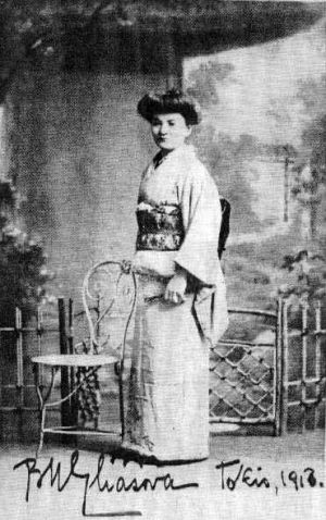 Barbora Markéta Eliášová (1874 - 1957), Česká cestovatelka, spisovatelka a učitelka.